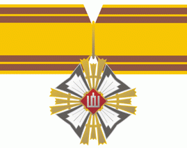 Lietuvos didžiojo kunigaikščio Gedimino ordinas